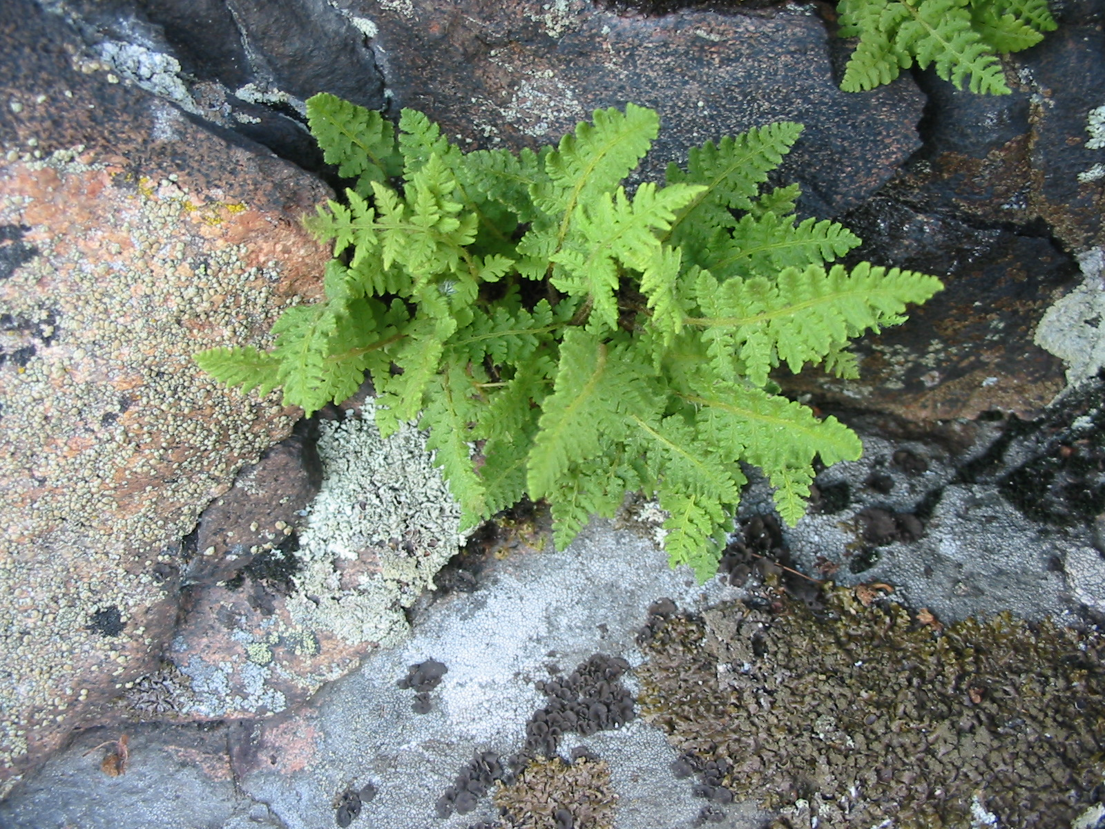 Karvakiviyrtti (Woodsia ilvensis). Suomi 29.6.2016.